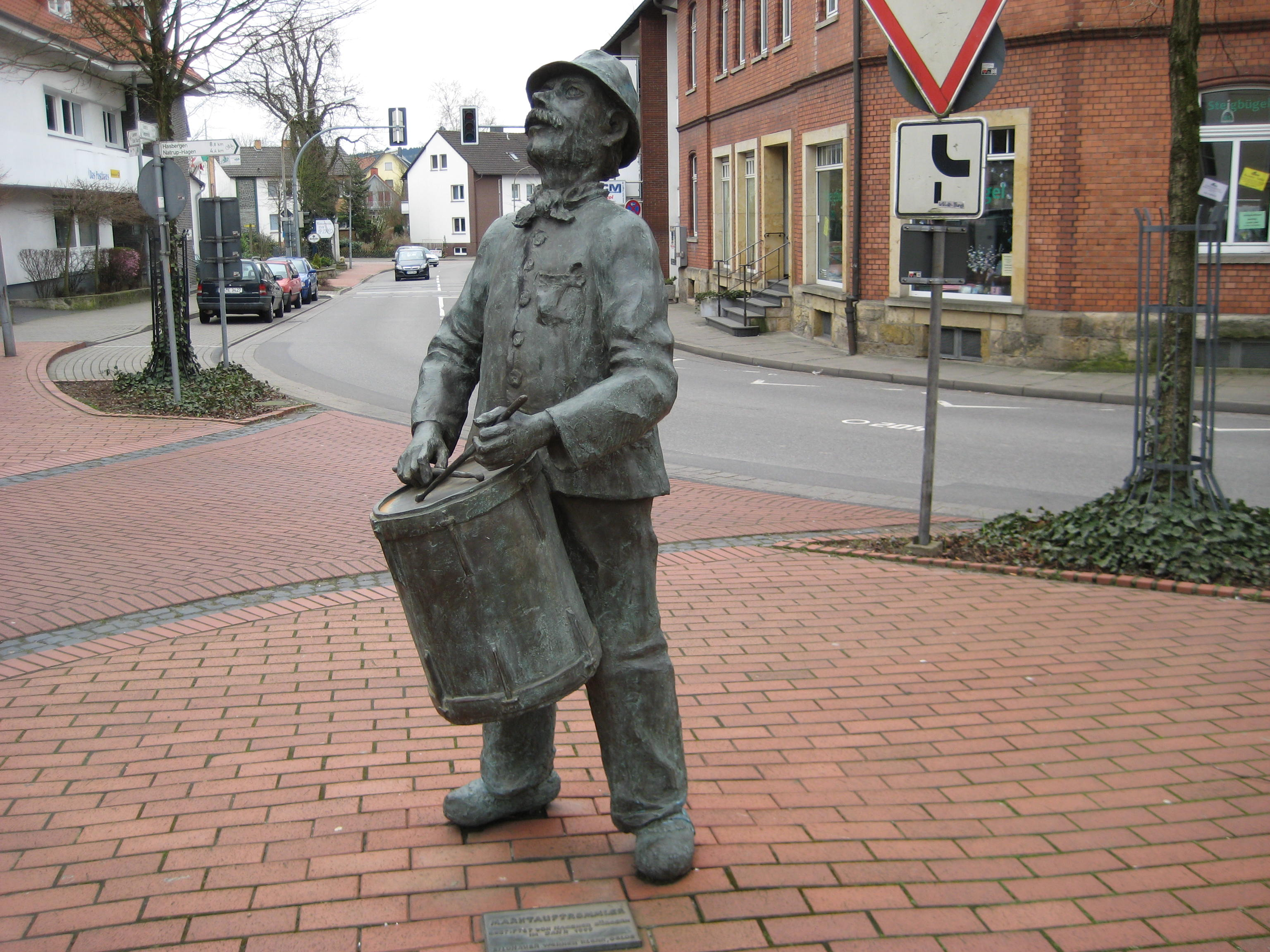 Plastik des Marktauftrommlers in Hagen am Teutoburger Wald, von Hagener Bürgern 1999 gestiftet, Plastik des Bildhauers Werner Klenk aus Oelde